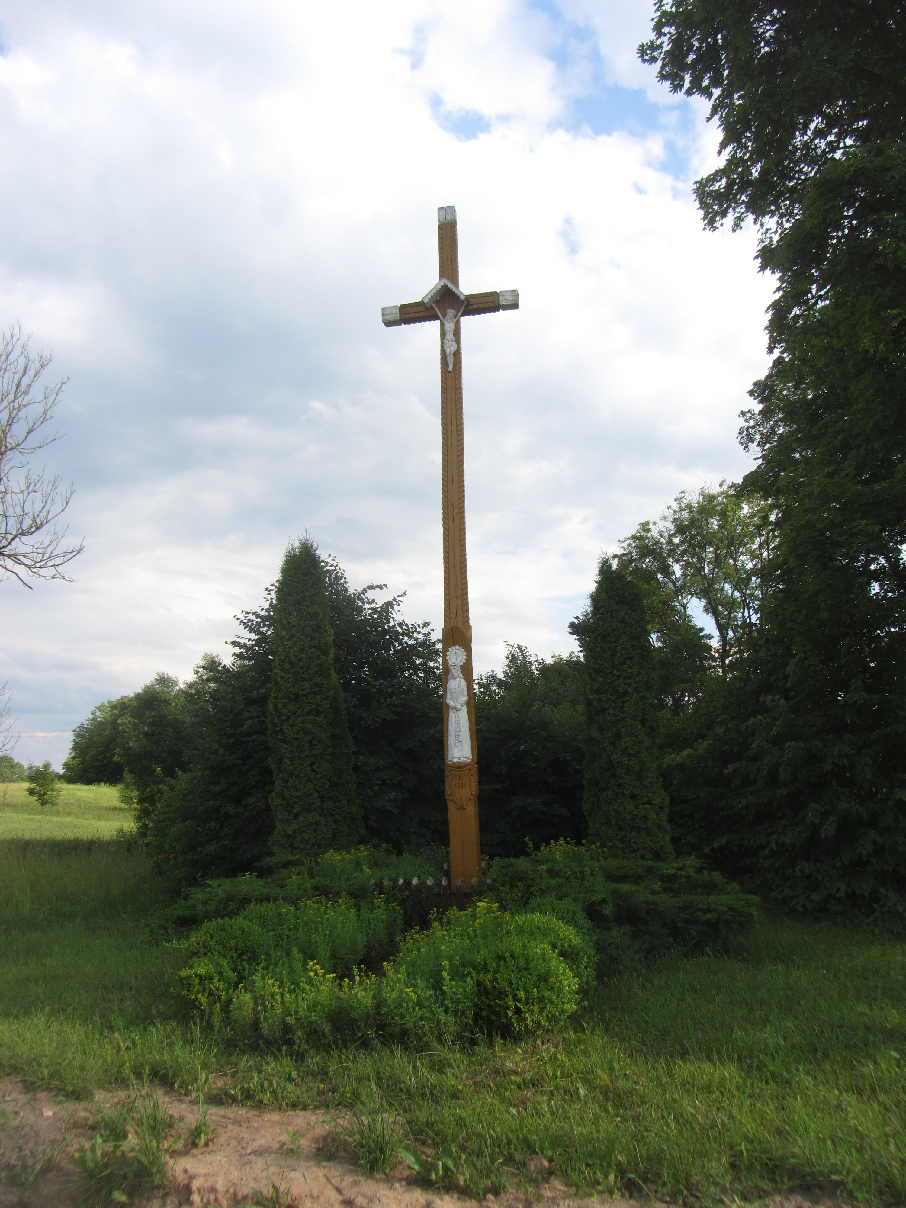 Pivašiūnų sen., Lithuania